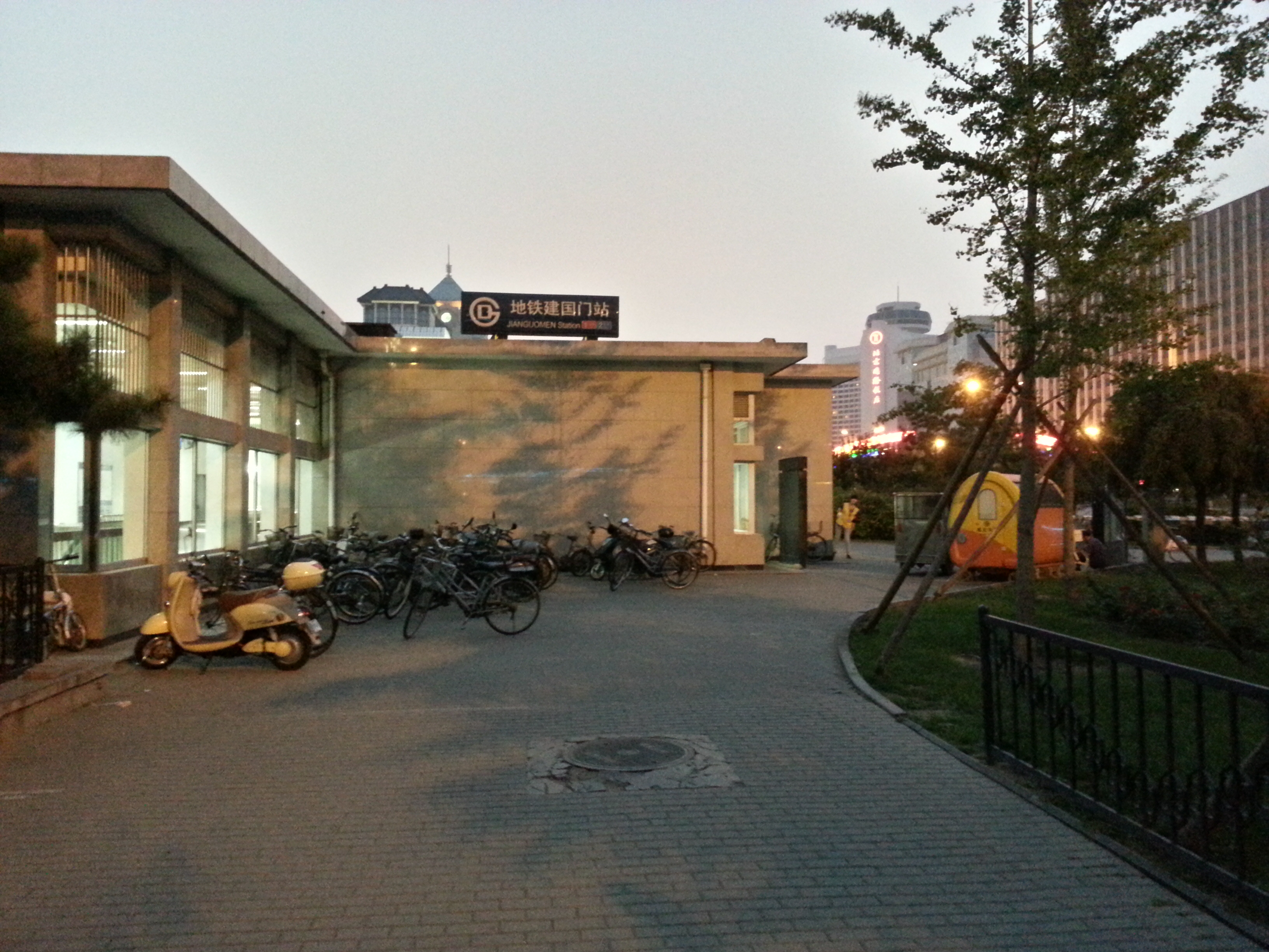 建国门站C口